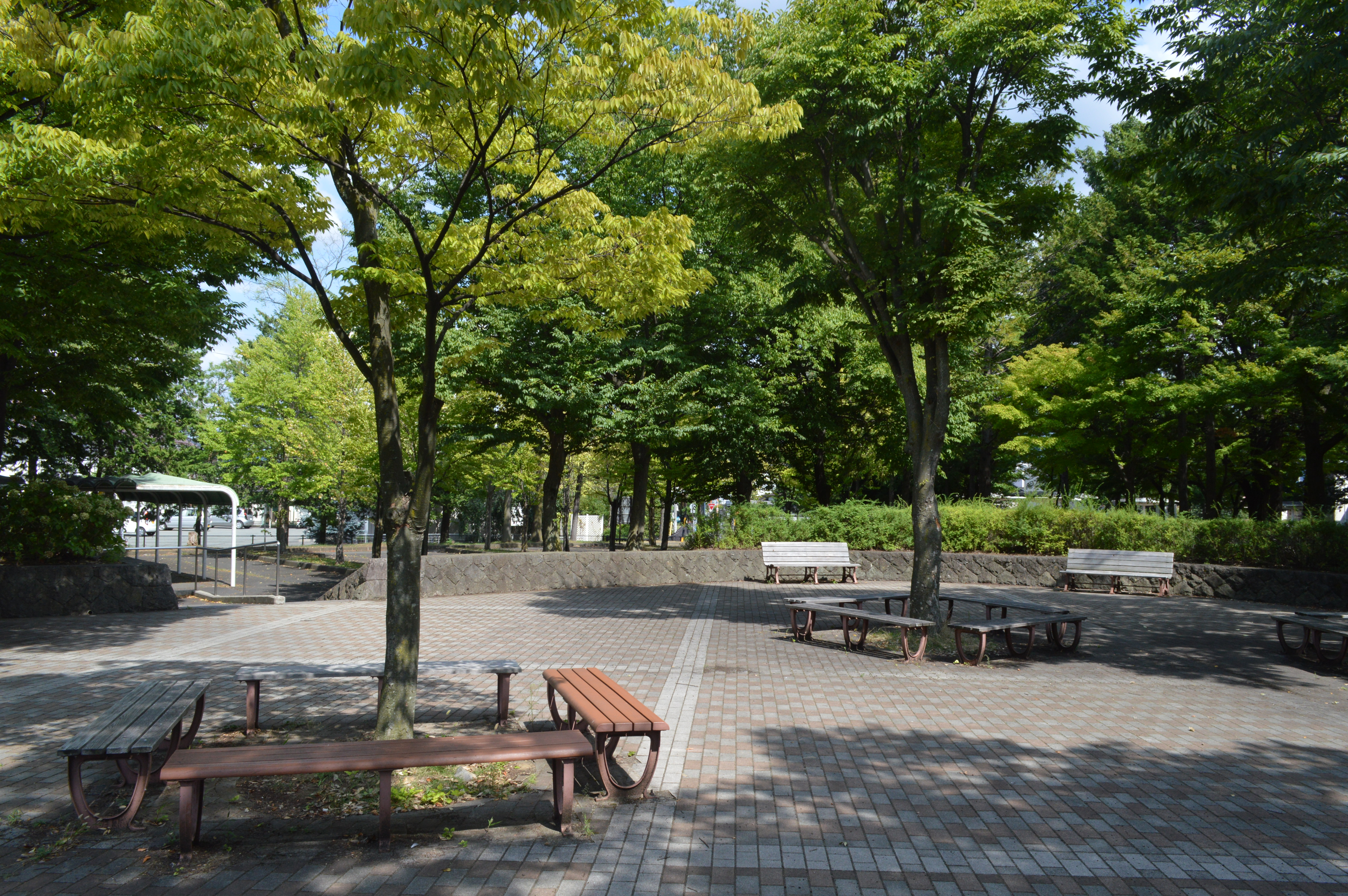 長野市の若里公園。